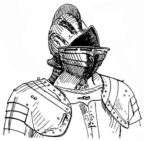 Geschobenes Achsel und geschobener Bart